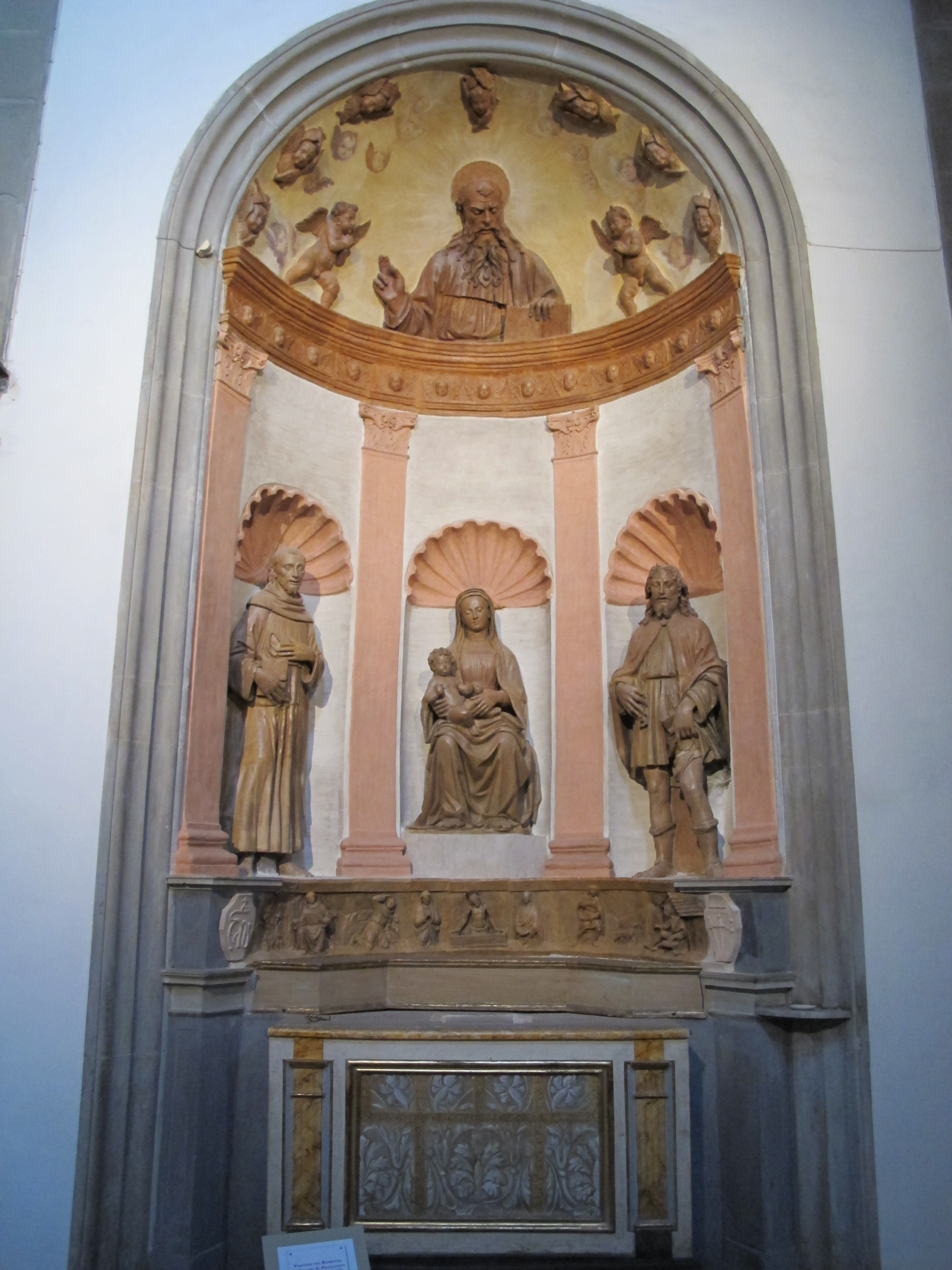 Santissima annunziata, arezzo, agostino di polo, altare di terracotta, 1526